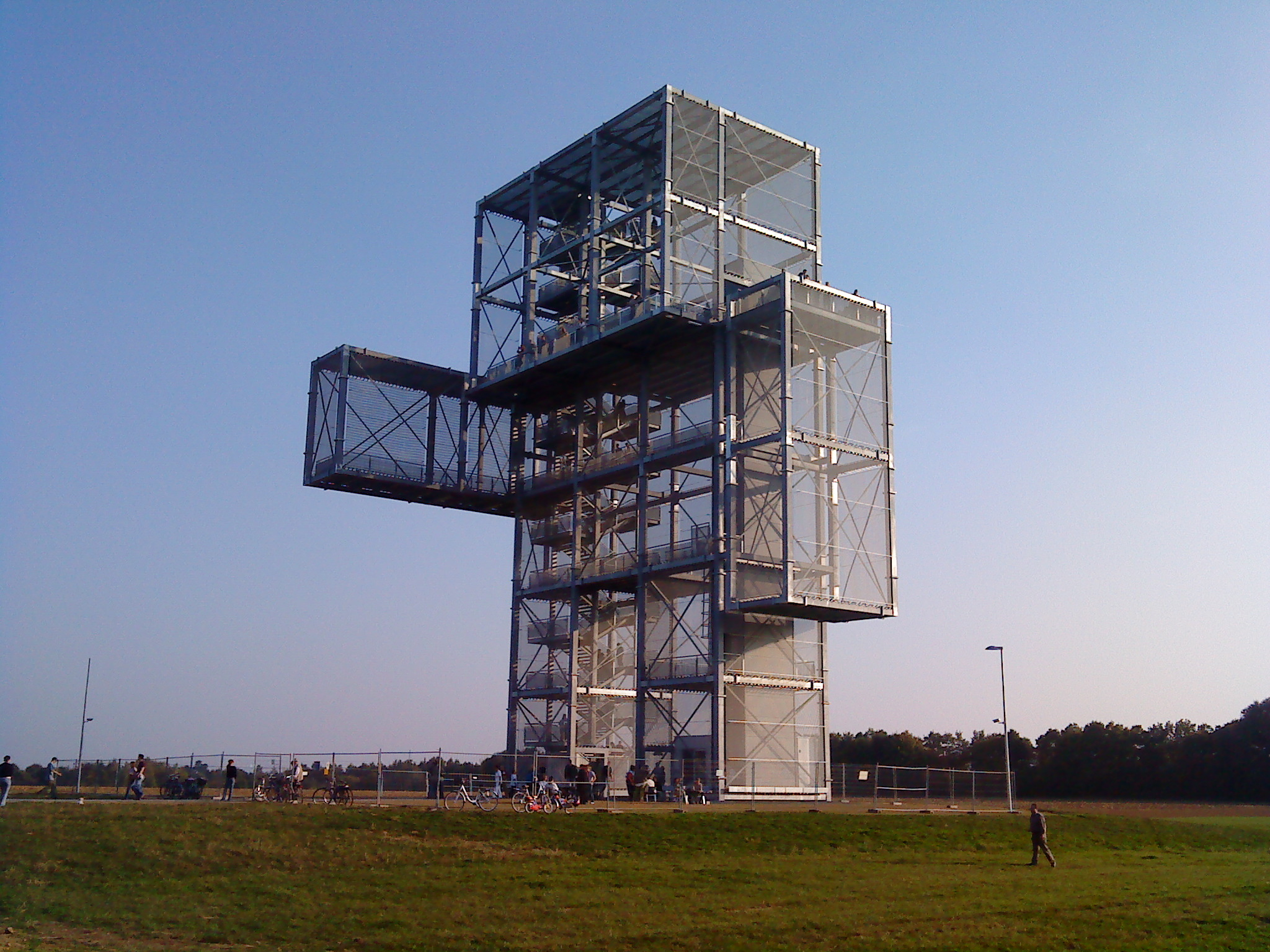 Indemann – Nordansicht